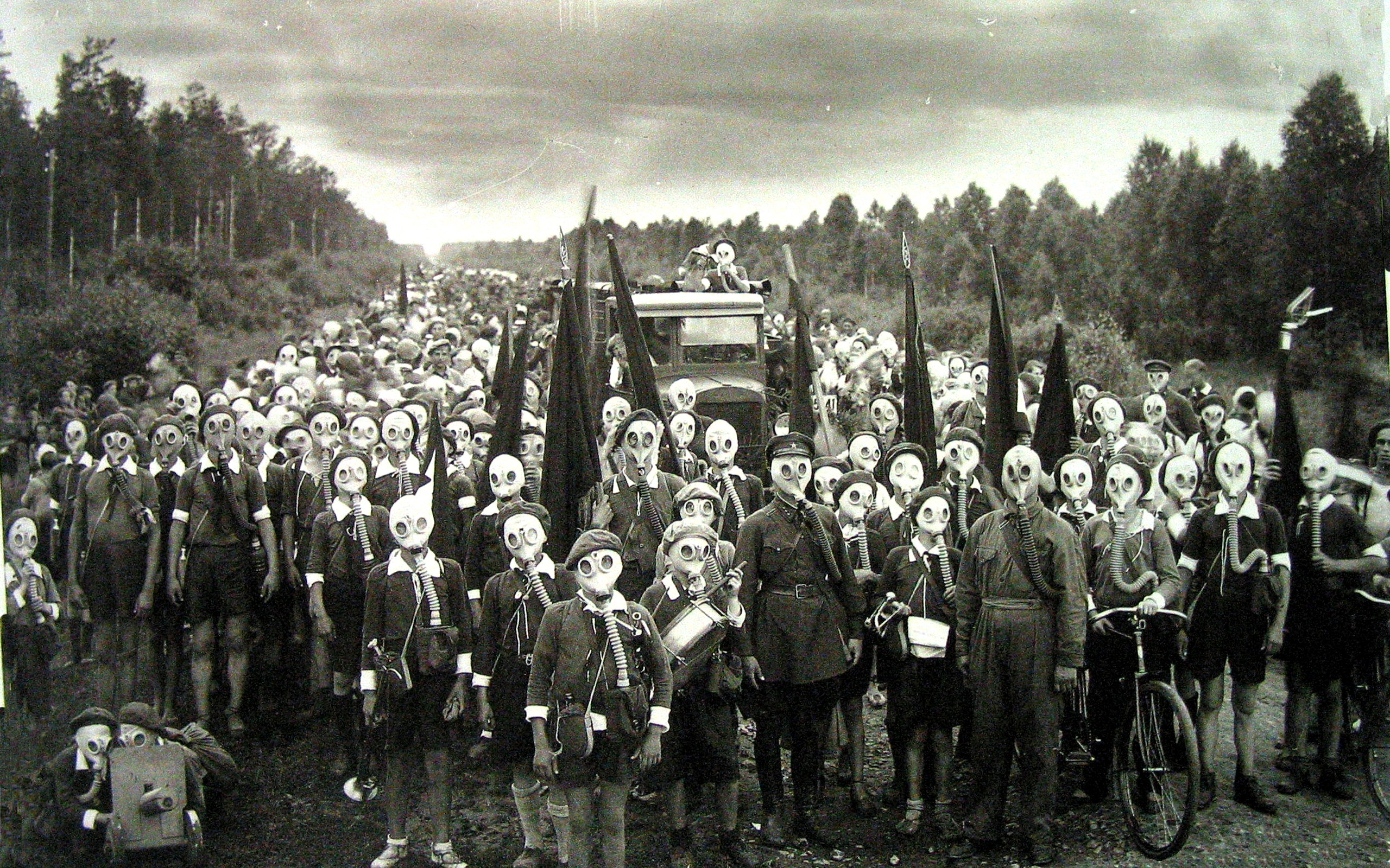 «Оборона пионеров». Дата съемки: январь 1937